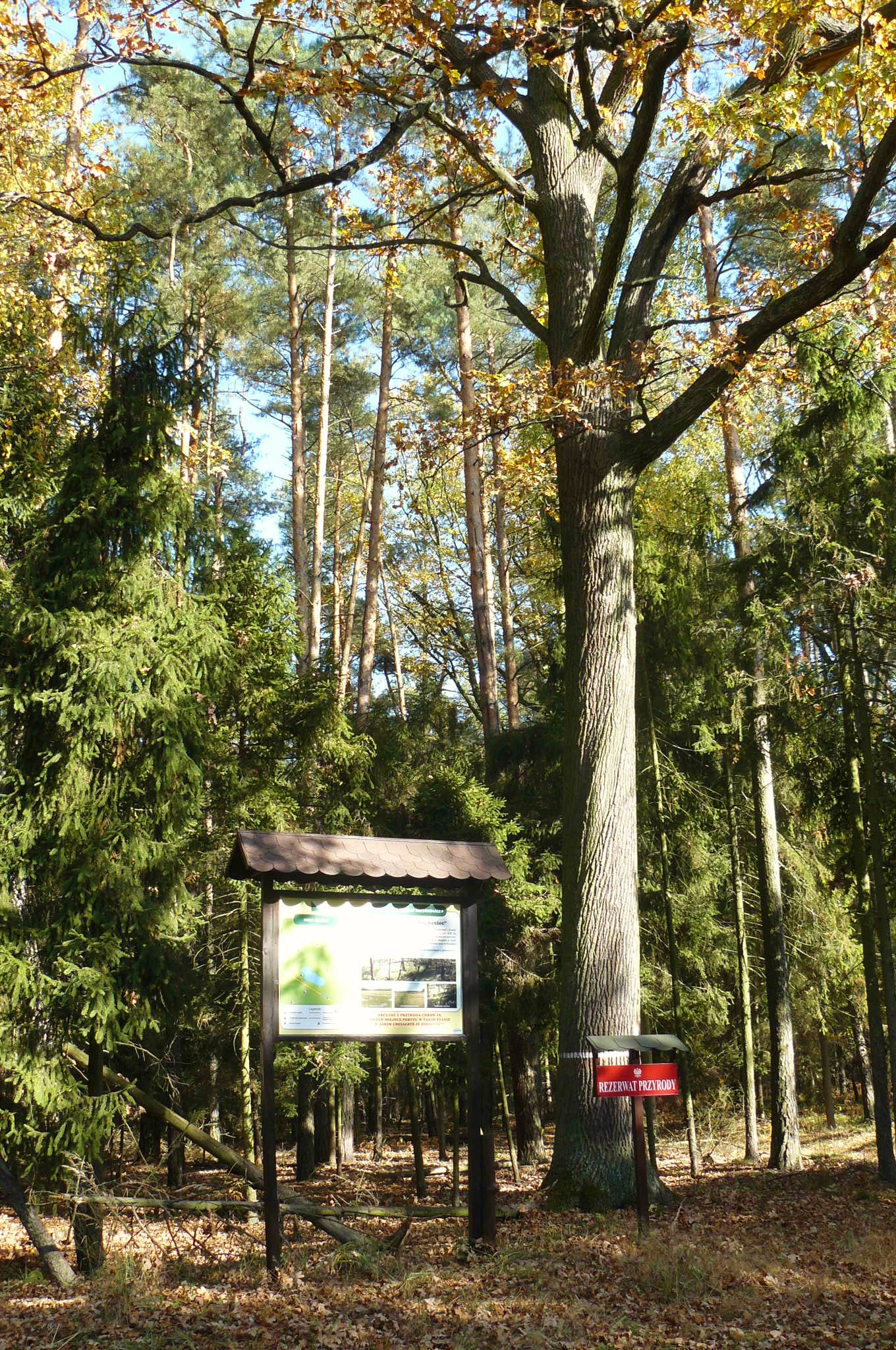 Tereny rezerwatu Mszar Bogdaniec - Obszar Chronionego Krajobrazu Dąbrowy Krotoszyńskie i Baszków-Rochy (okolice Konarzewa).